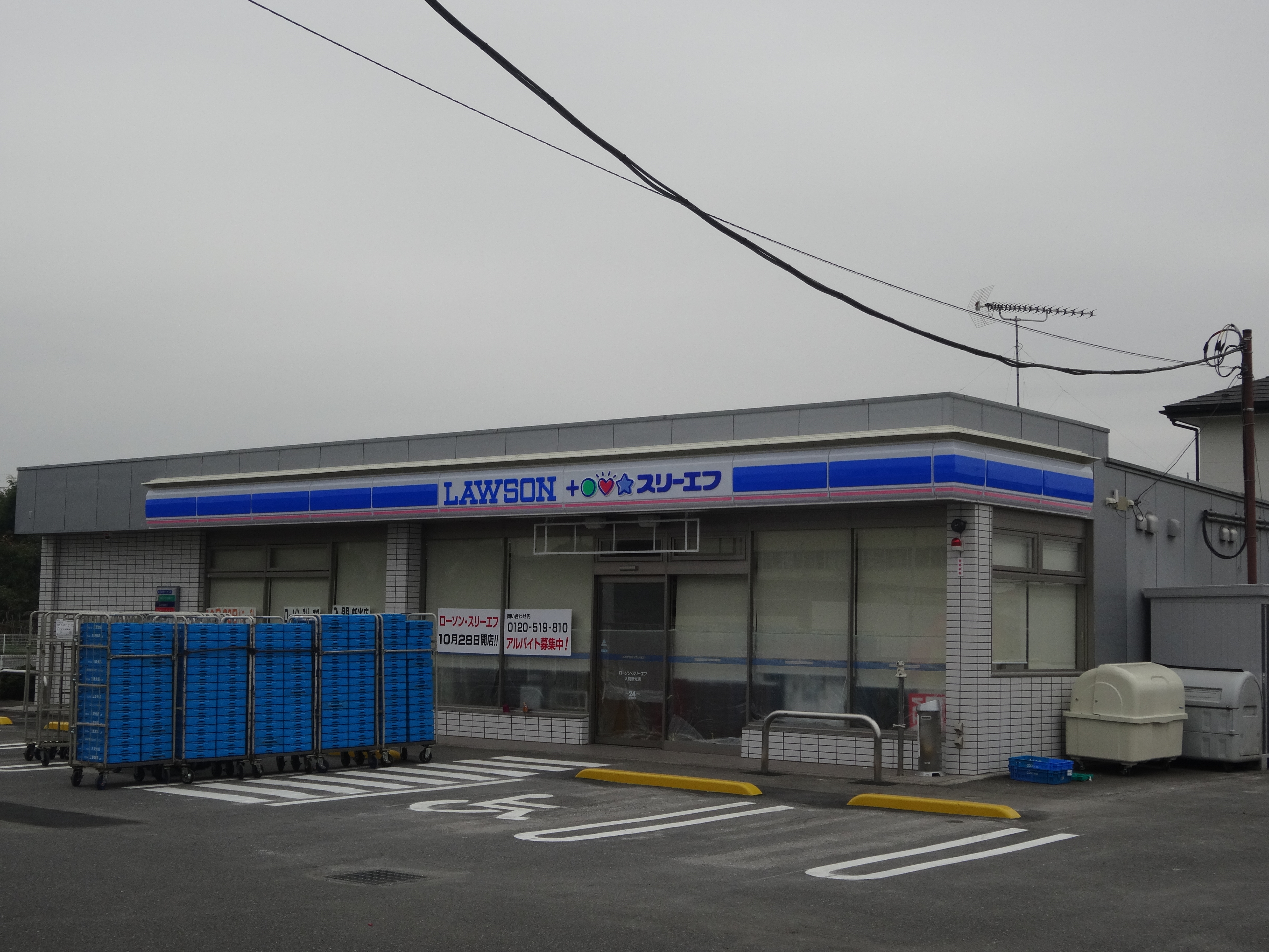 ローソン・スリーエフ入間新光店（開店前のもの）。ローソンとスリーエフが合体したコンビニエンスストアである。2016年10月28日開店。